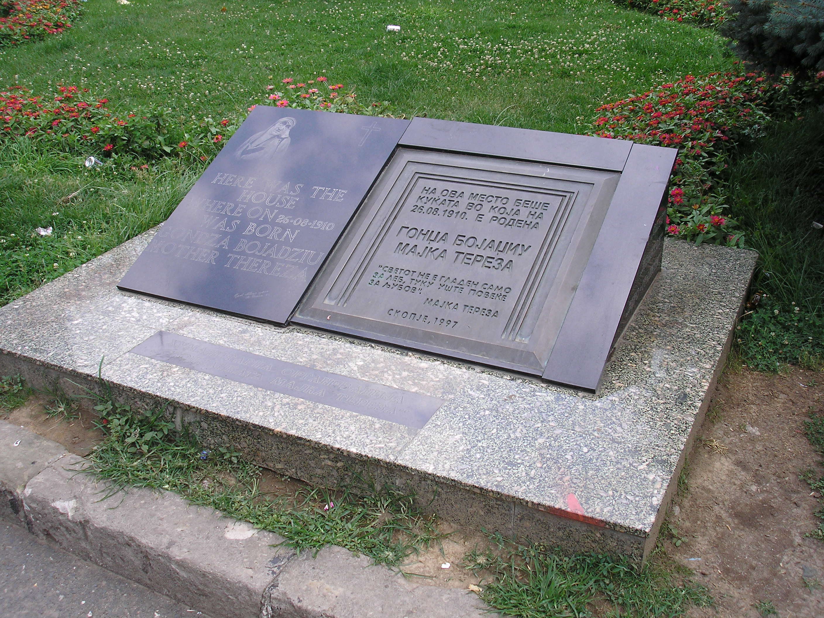 Teréz anya szülőházának helye, Szkopje, Macedónia